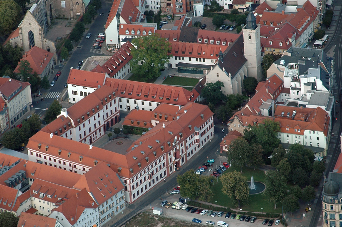 Luftbild aus Richtung Südosten von der Kurmainzischen Statthalterei in Erfurt; darüber das ehemalige Augustinereremitenkloster im Valentinerhof (heute Teil der Stadtverwaltung) mit der Wigbertikirche